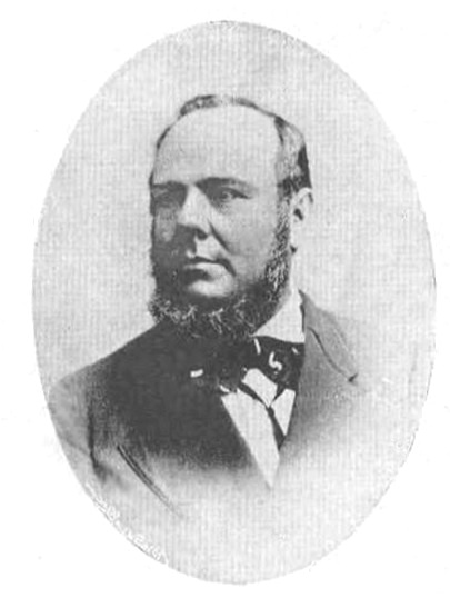 Aniceto Esquivel Sáenz (1824-1898), presidente de Costa Rica de mayo a julio de 1876.